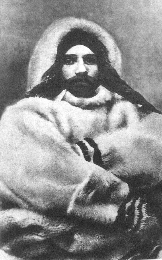 А.В. Колчак во время первой зимовки у п-ва Таймыр. 1900/1901 г